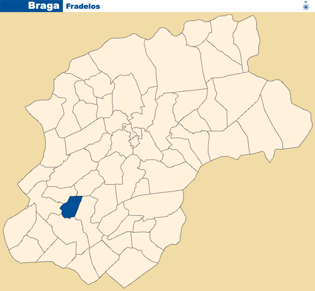 Localização de Fradelos no concelho de Braga.